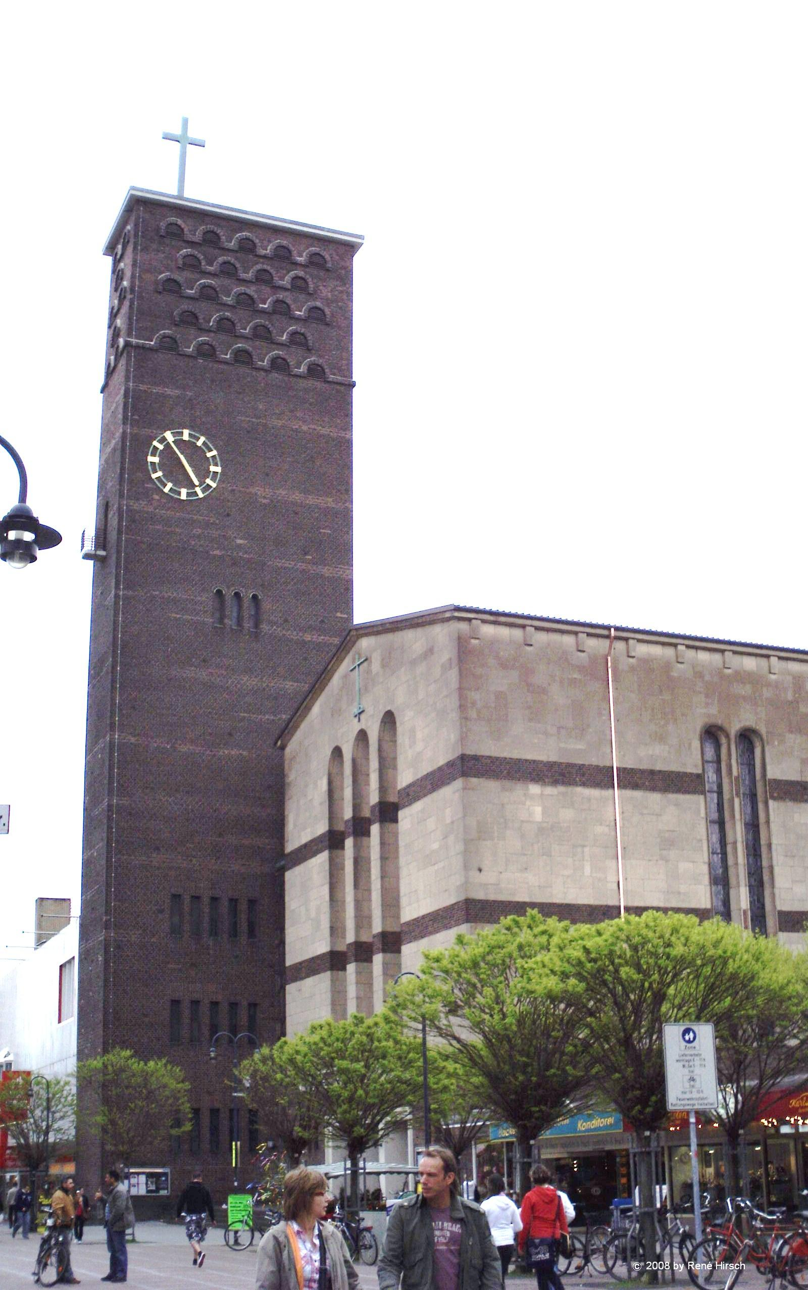 Leverkusen-Wiesdorf, Herz-Jesu Kirche